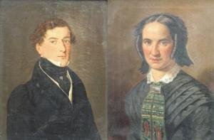 Biedermeierporträts des Freiburger Ehepaares Johann Nepomuk Bader und Kunigunde Bader, signiert und 1854 datiert; 35 x 26 cm.